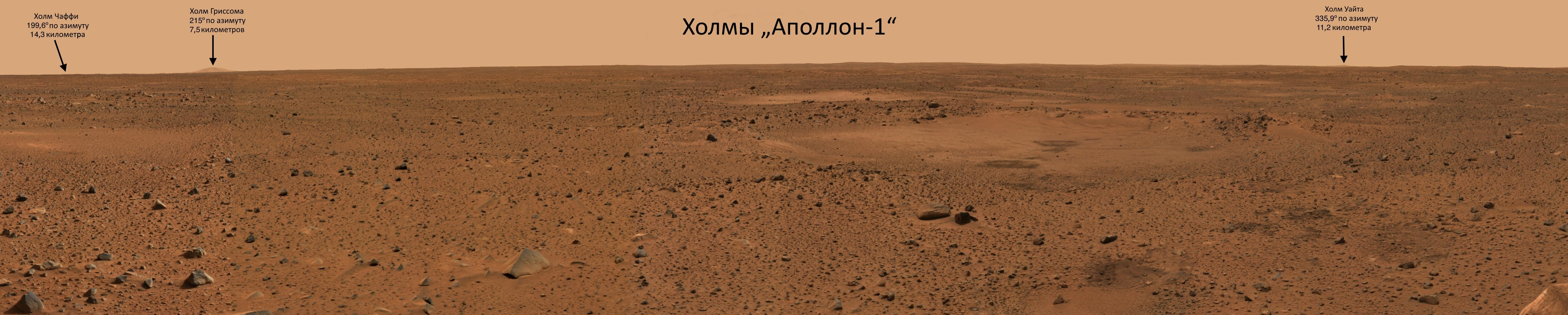 На снимке панорамной камеры PanCam марсохода Спирит, сделанном в направлении на запад, изображены близлежащие холмы. Они названы в честь астронавтов корабля «Аполлон-1». Экипаж «Аполлон-1» погиб при пожаре во время испытания корабля в Космическом центре им. Кеннеди в штате Флорида 27 января 1967 г.